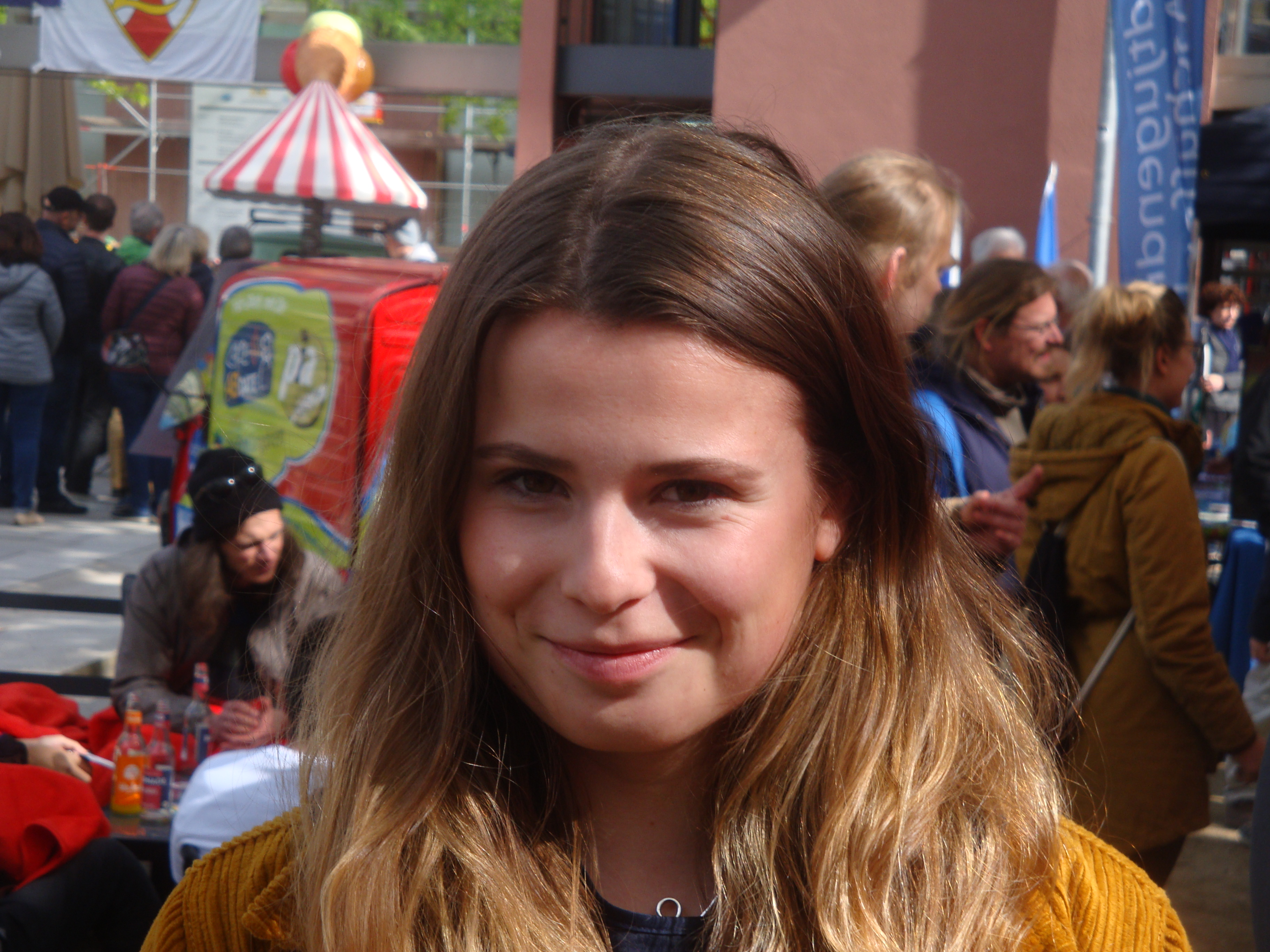 Luisa Neubauer auf dem Europafest in Aschaffenburg